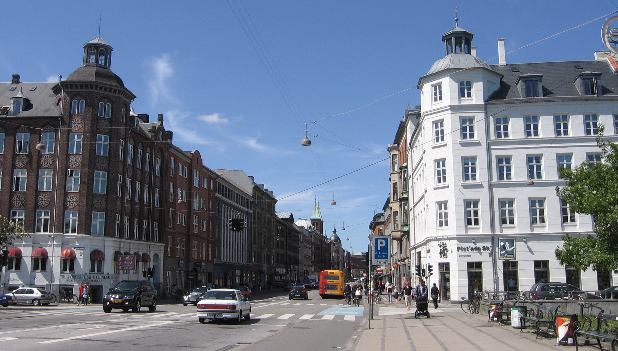 Street in Copenhagen, Denmark